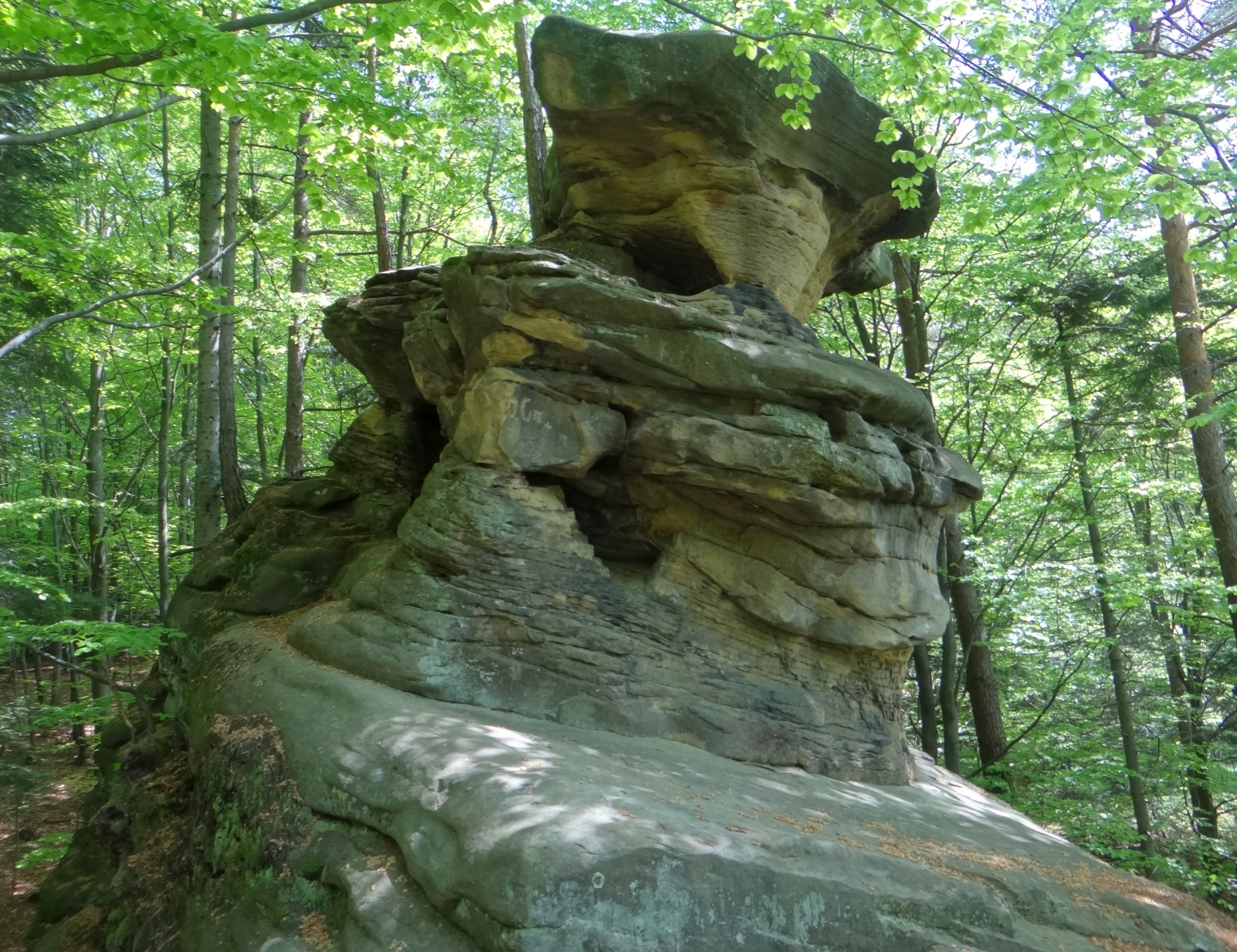 Schronisko w Grzybku